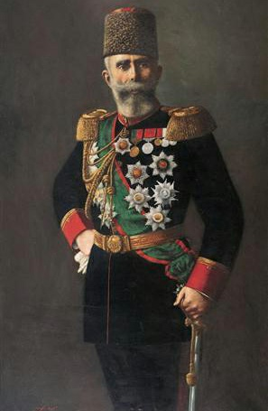 Gemälde von Mahmut Schevket Pascha